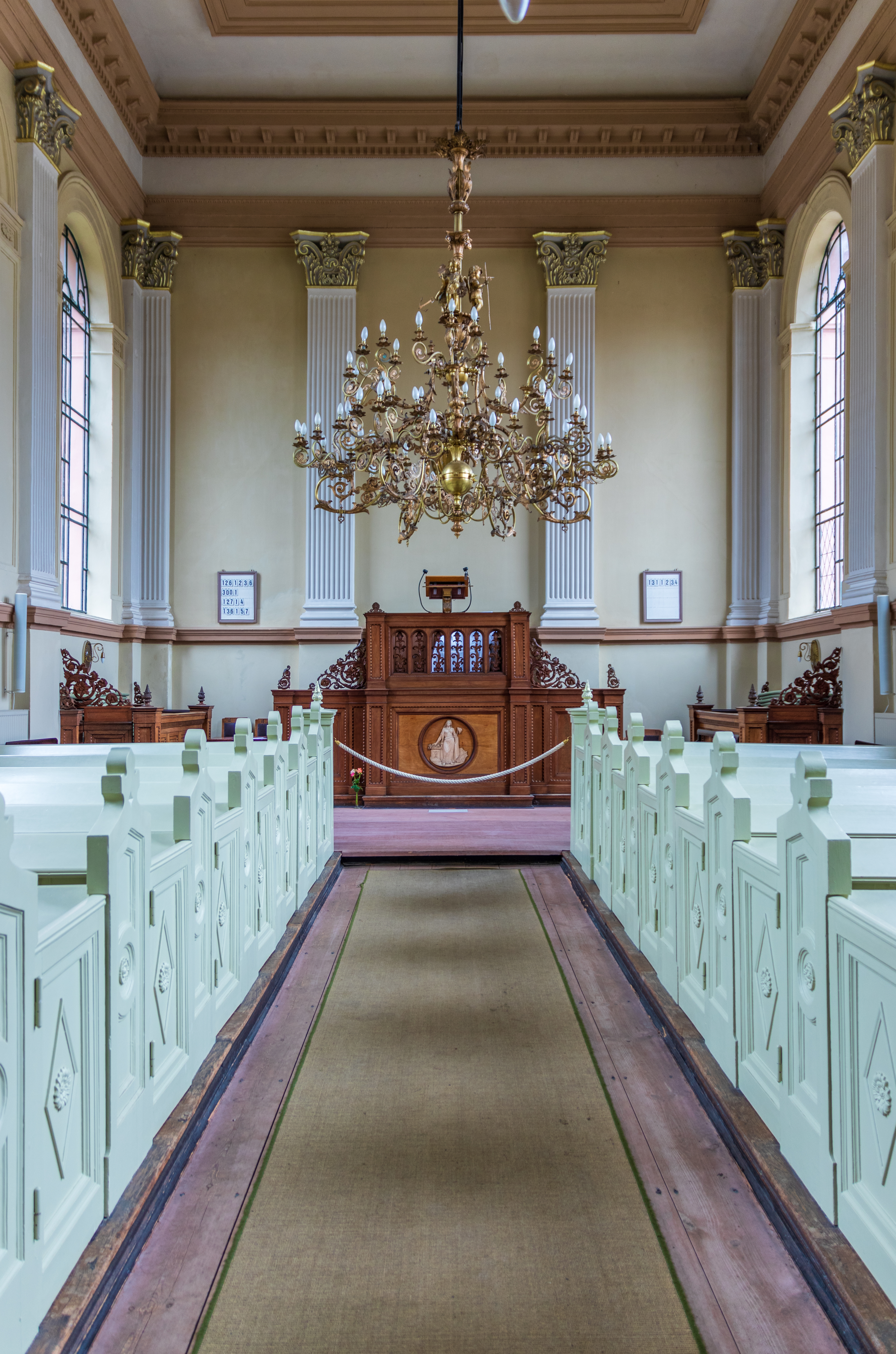 Innenraum der Remonstrantenkirche (Friedrichstadt)